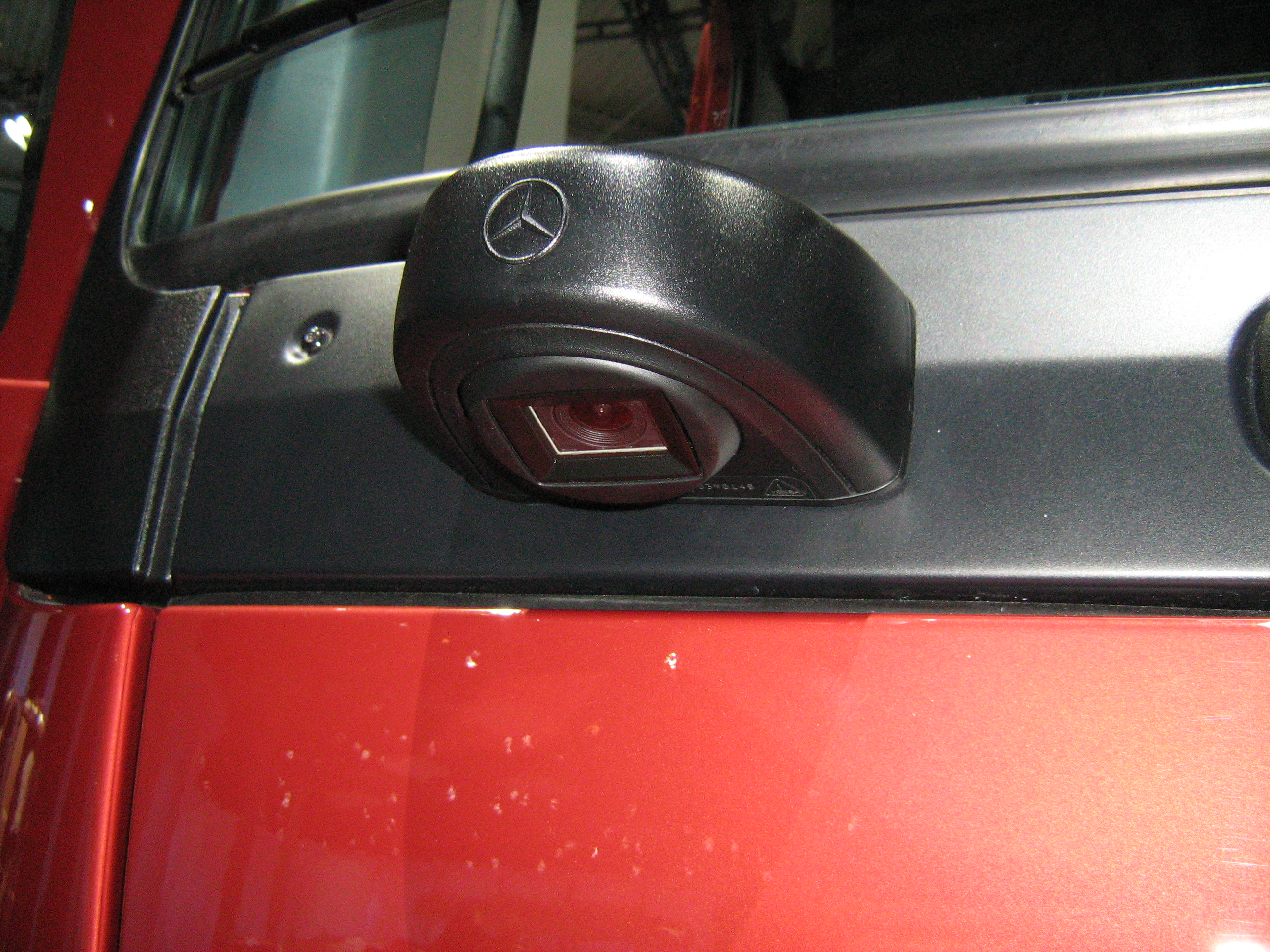 LKW Front-Kamera - als Ersatz für den LKW-Frontspiegel